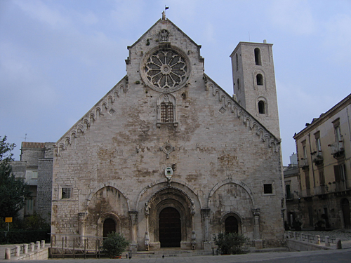 Cattedrale di Ruvo di Puglia